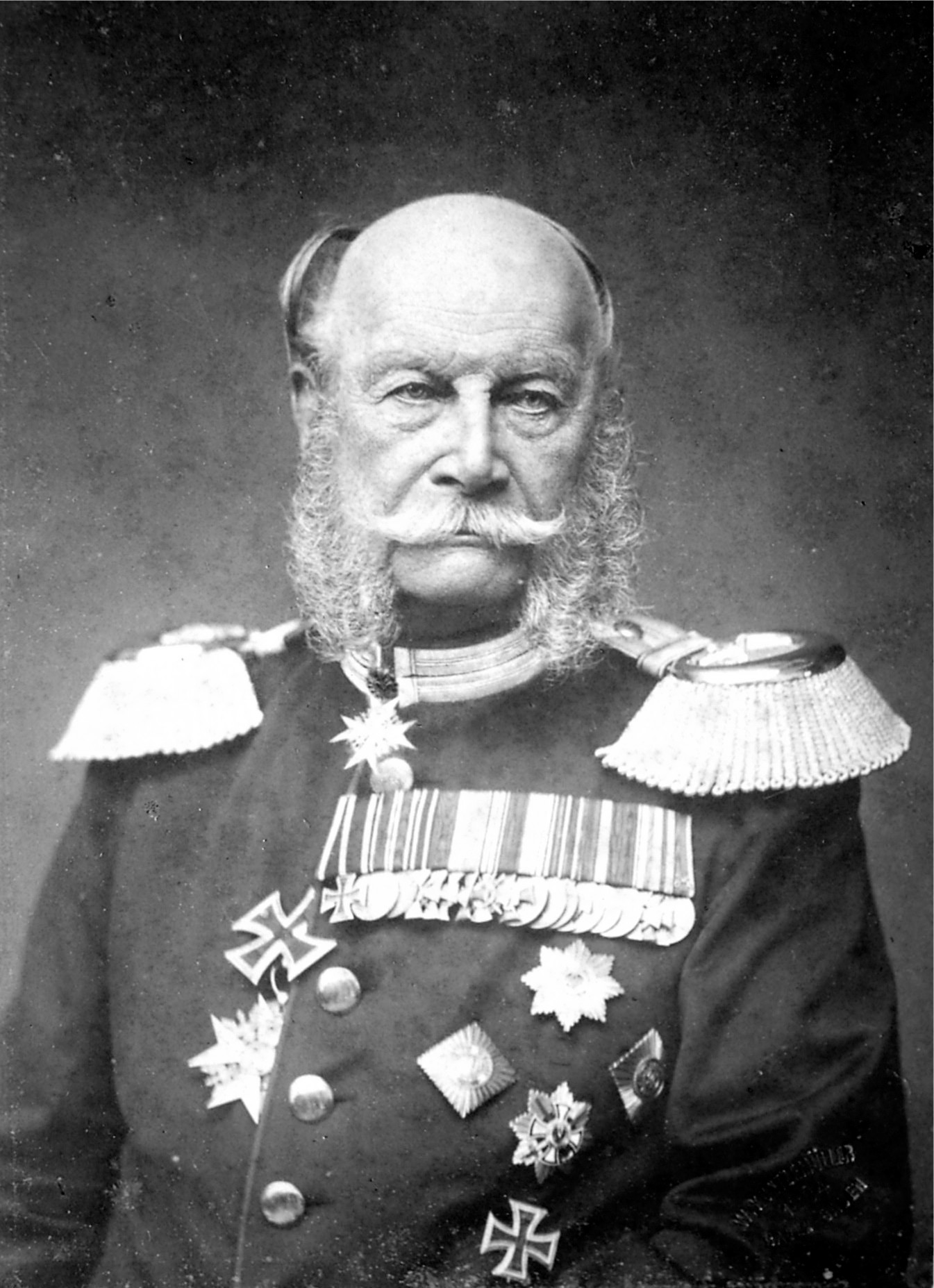 Wilhelm I., Deutscher Kaiser in Generalsuniform